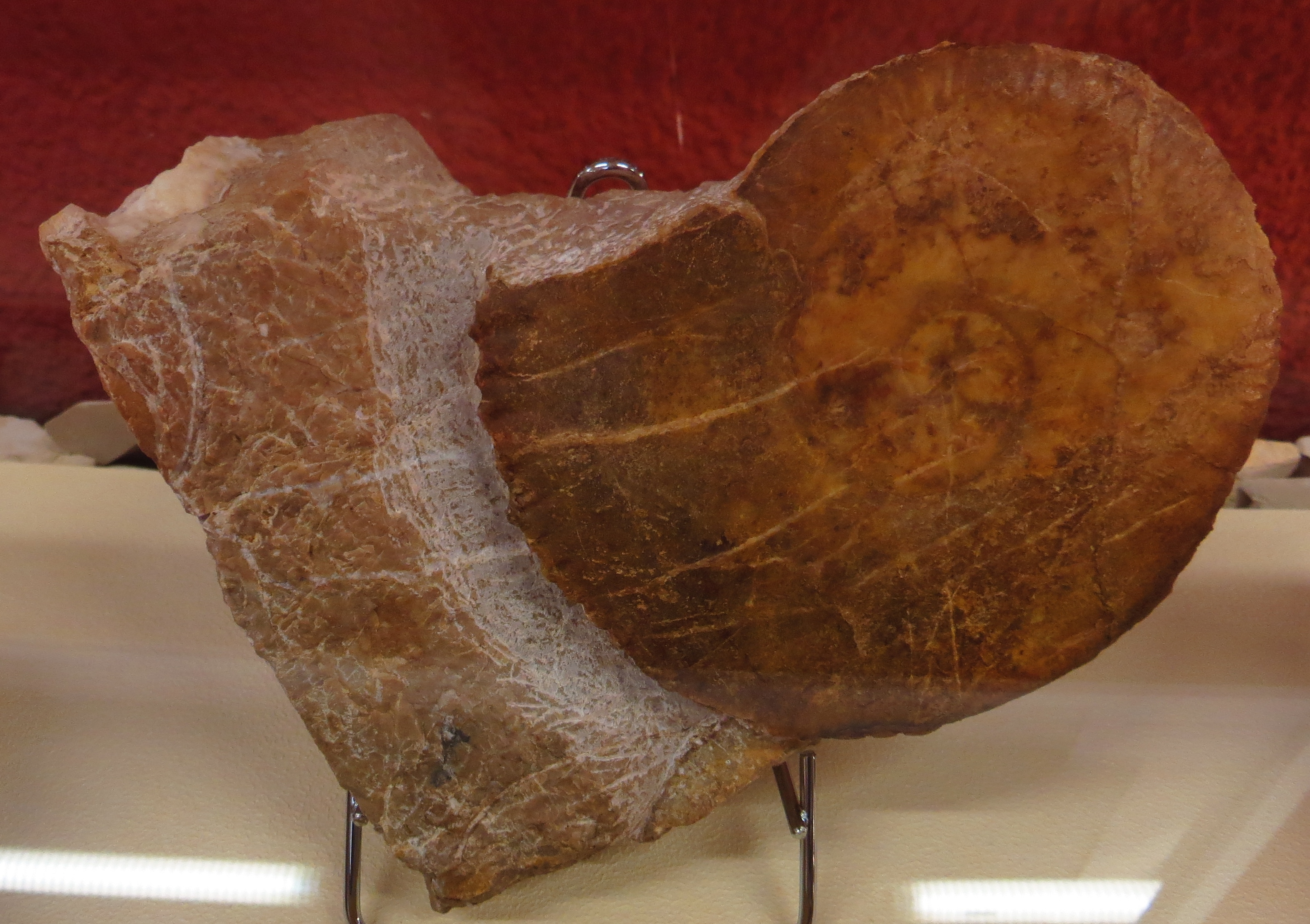 Took the picture at Burgmeister Muller Museum, Solnhofen